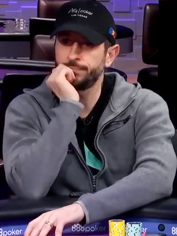 Brian Rast beim Super High Roller Bowl V